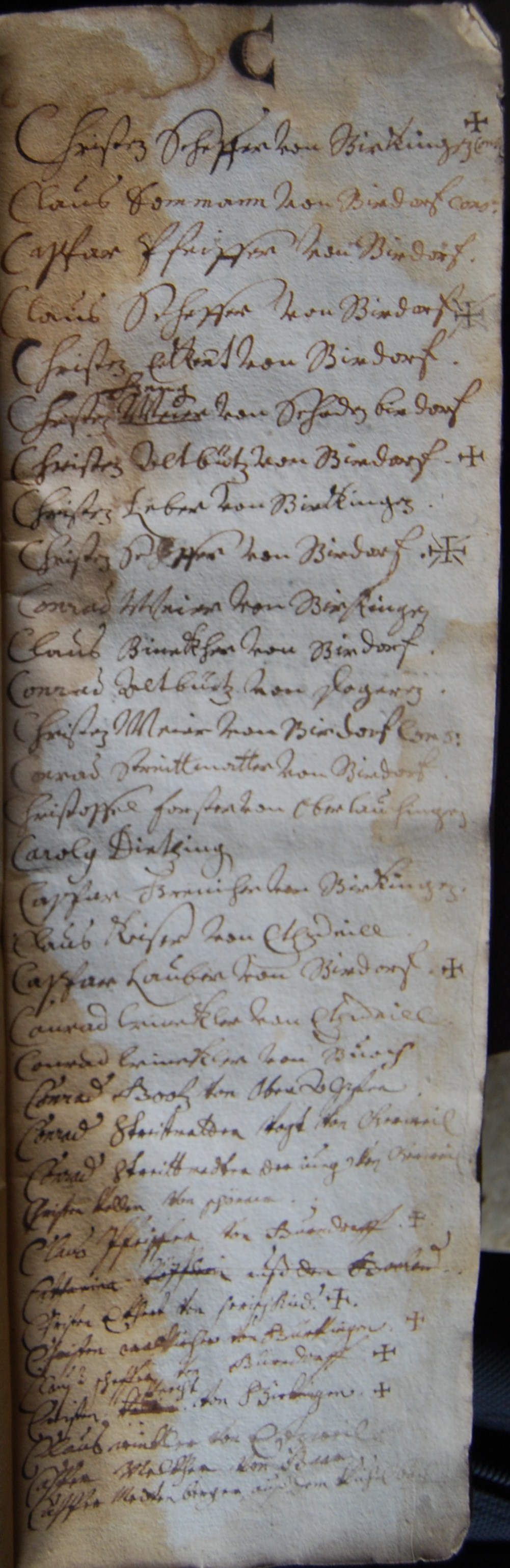 Auszug aus dem Mitgliederverzeichnis der Birkinger Rosenkranzbruderschaft